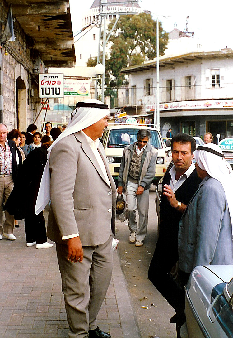 Multikulturell Gesellschaft zu Nazareth